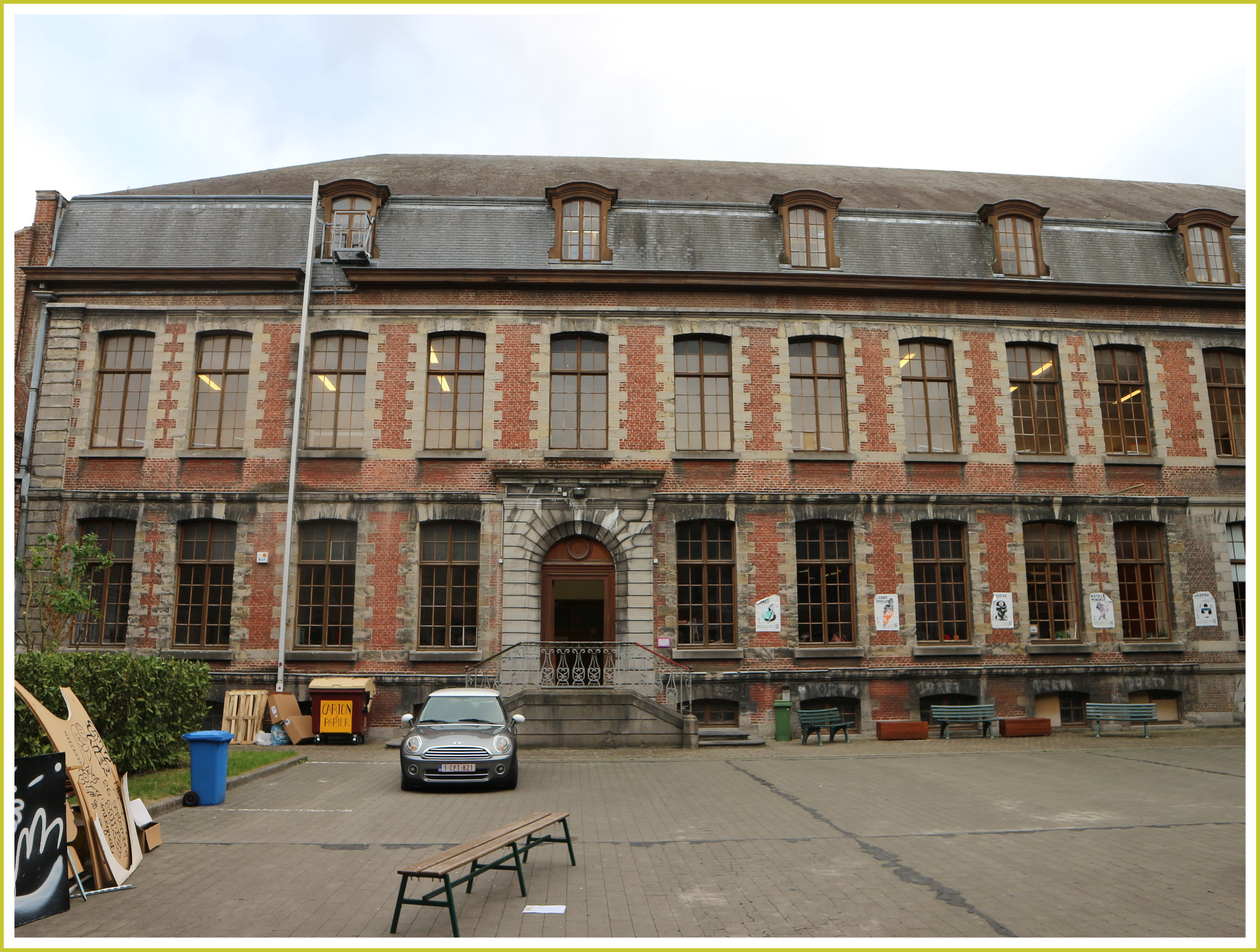 Occupé aujourd’hui par l’Académie des Beaux-Arts, cet immeuble était à l’origine un ancien hôpital, connu sous le nom de « Charité du Gué. Le bâtiment tel qu’il se présente a été reconstruit au milieu du XVIIIe siècle en style Louis XIV, en remplacement d’un édifice du XIIe siècle. Il se compose de trois ailes formant un plan en U.